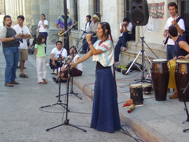 Lila Downs in Oaxaca 2005.